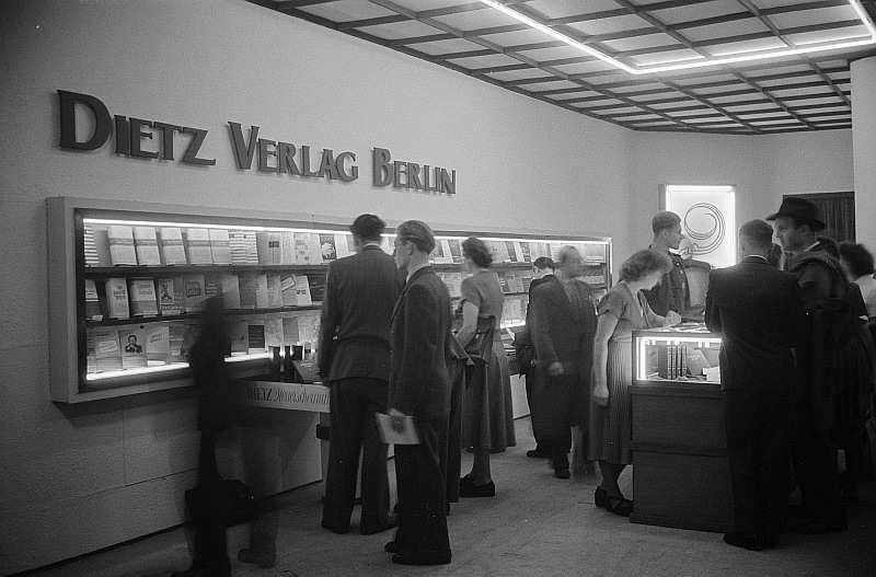 Original image description from the Deutsche Fotothek Fachbesucher am Messestand des Dietz-Verlags Berlin